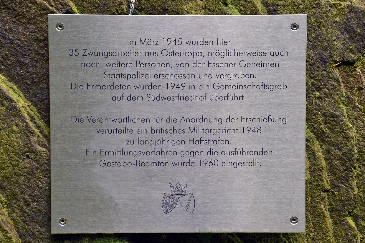 Gedenktafel zum Montagsloch im Grugapark in Essen. Hier wurden 1945 von der Gestapo hingerichtete russische Zwangsarbeiter gefunden.